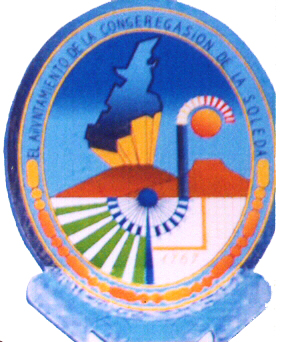 ESCUDO DEL MUNICIPIO DE SOLEDAD DE GRACIANO SANCHEZ ESCUDO DEL MUNICIPIO DE SOLEDAD DE GRACIANO SANCHEZ